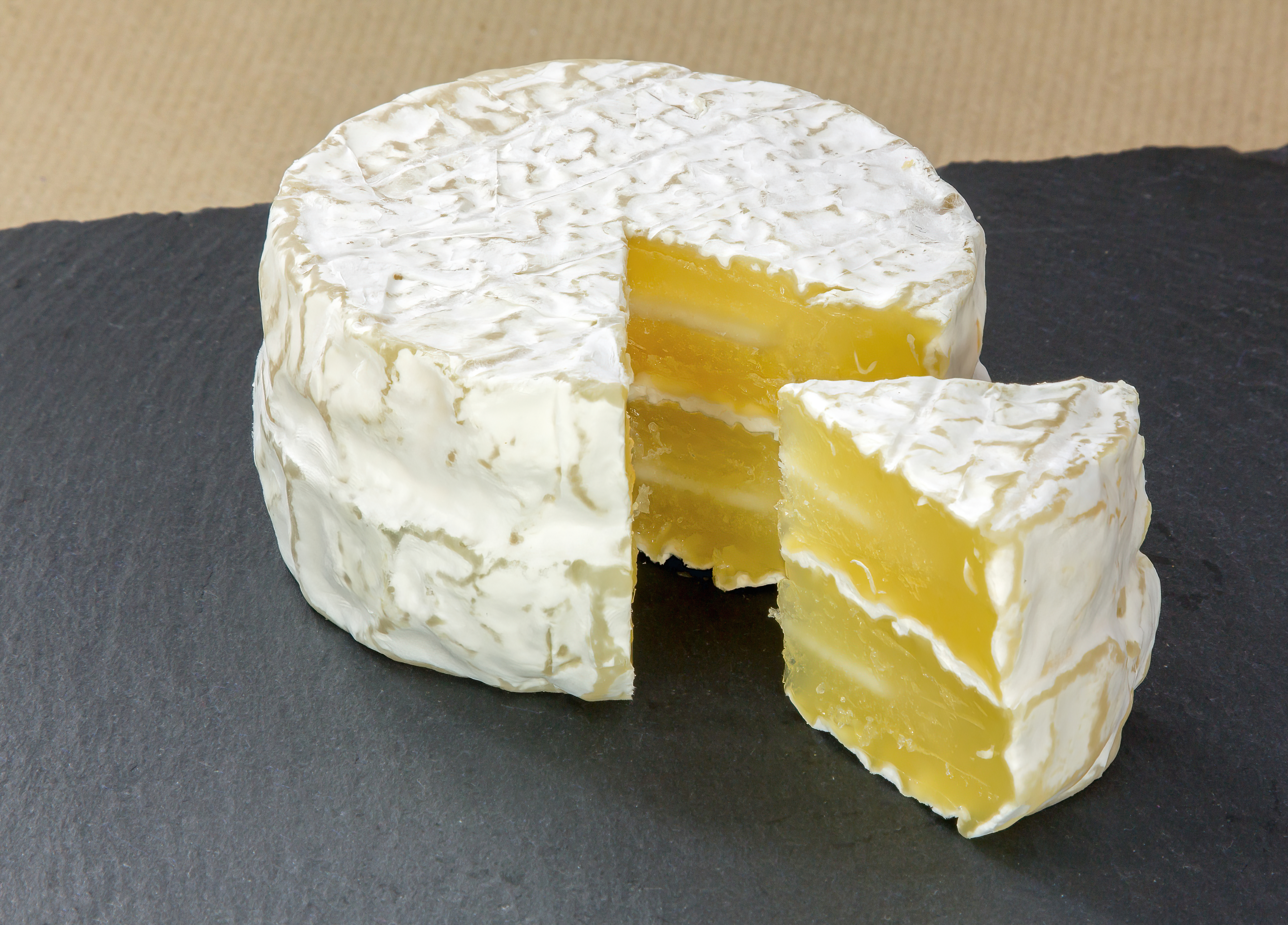 Loose Korbkäse